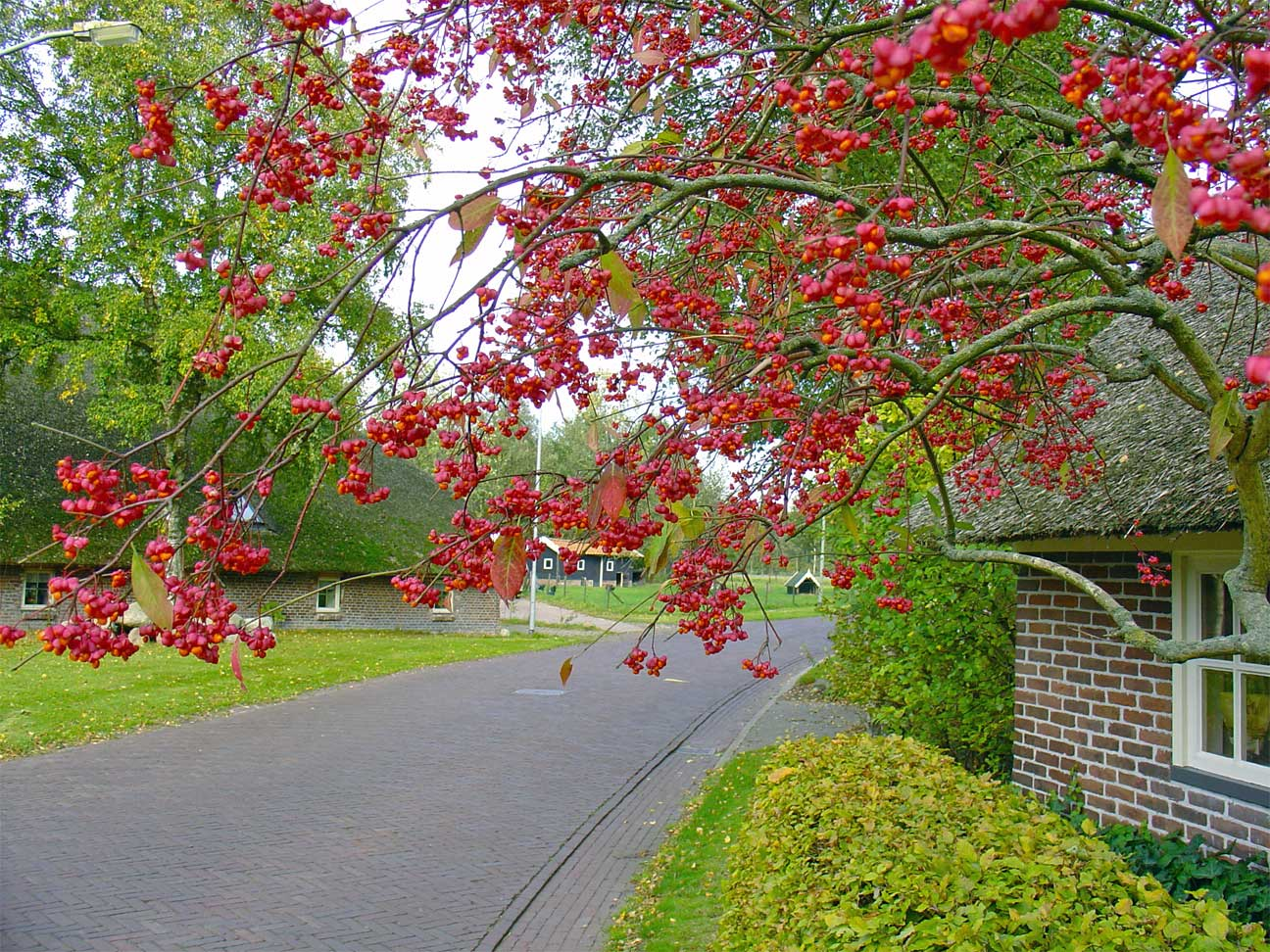 Nijlande (dorpsgezicht)